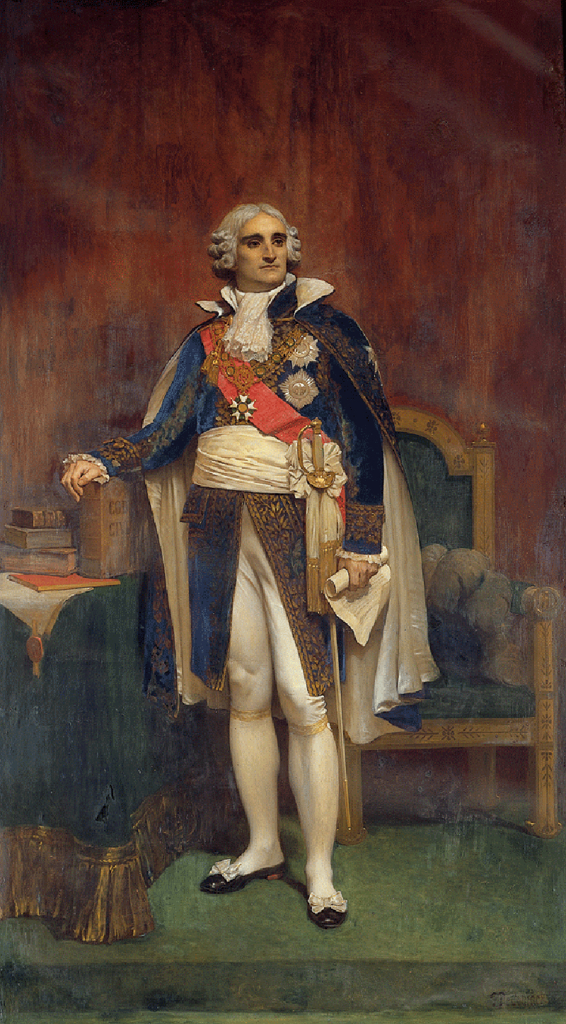 Portrait of Jean-Jacques-Régis de Cambacérès (1753-1824)